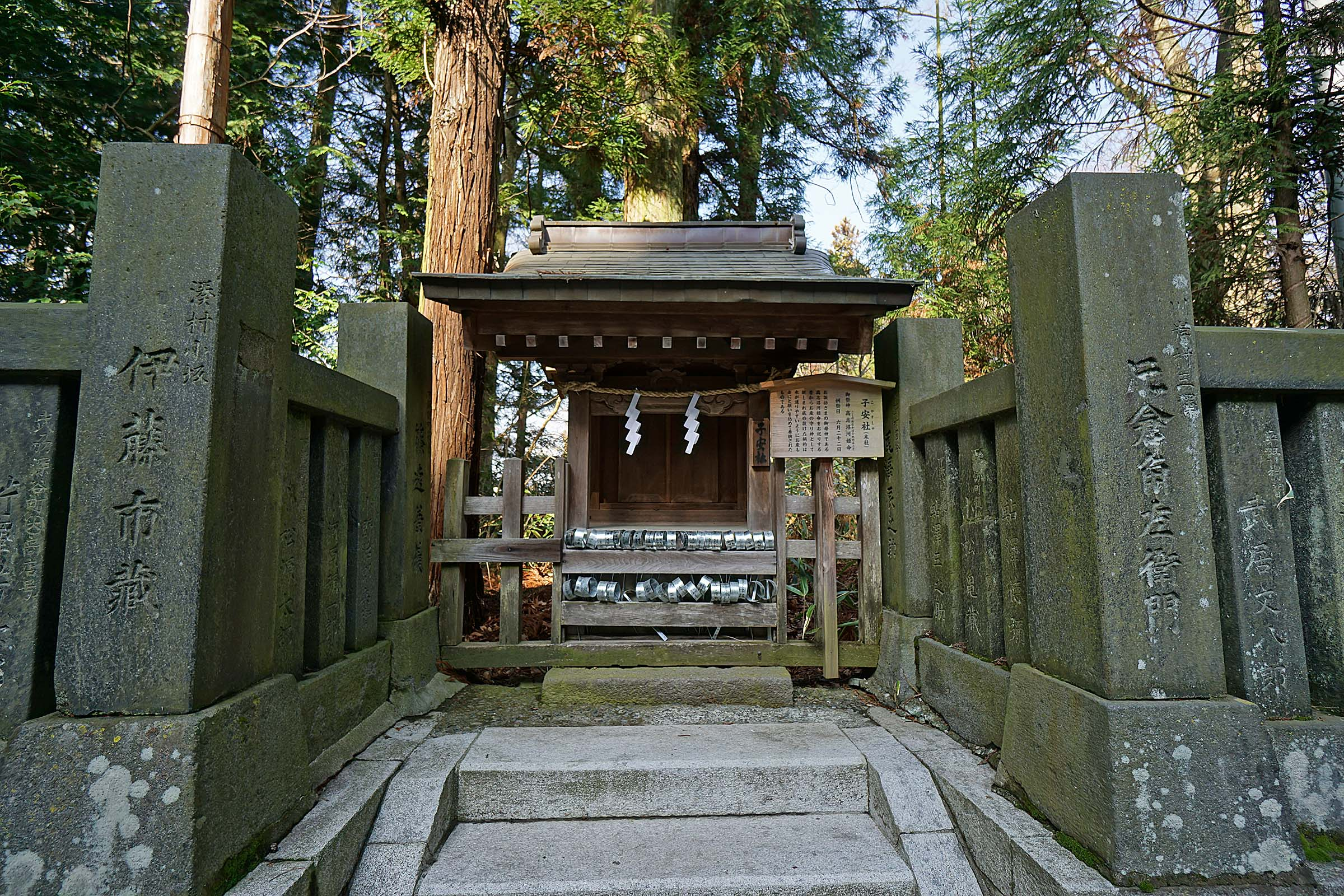 Suwa taisha Shimosha Harumiya , 諏訪大社 下社 春宮 子安社